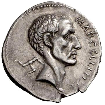 Marcus Claudius Marcellus (né vers 268 av. J.-C. et mort en 208) était un général romain, héros de la deuxième guerre punique et un homme politique, qui fut préteur en -224 et cinq fois consul (-222, -215 en remplacement de Lucius Posthumus Albinus, -214, -210 et -208).